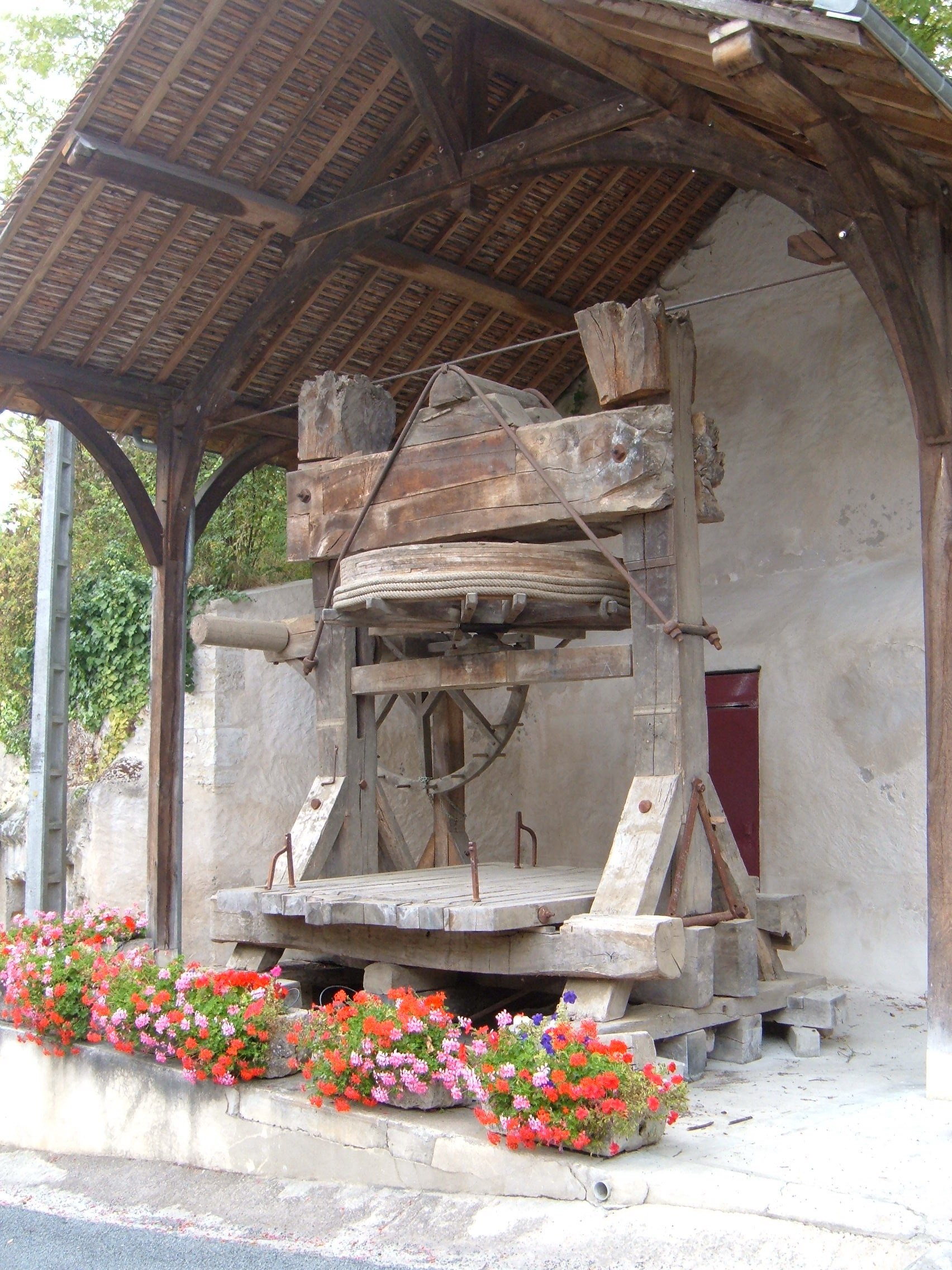 A wine press outside Chateau Montcontour in Vouvray, France.